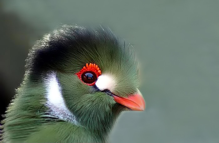 Weissohrturako (Tauraco leucotis) Aufgenommen mit einer Canon EOS 300D im Tierpark Mönchengladbach.